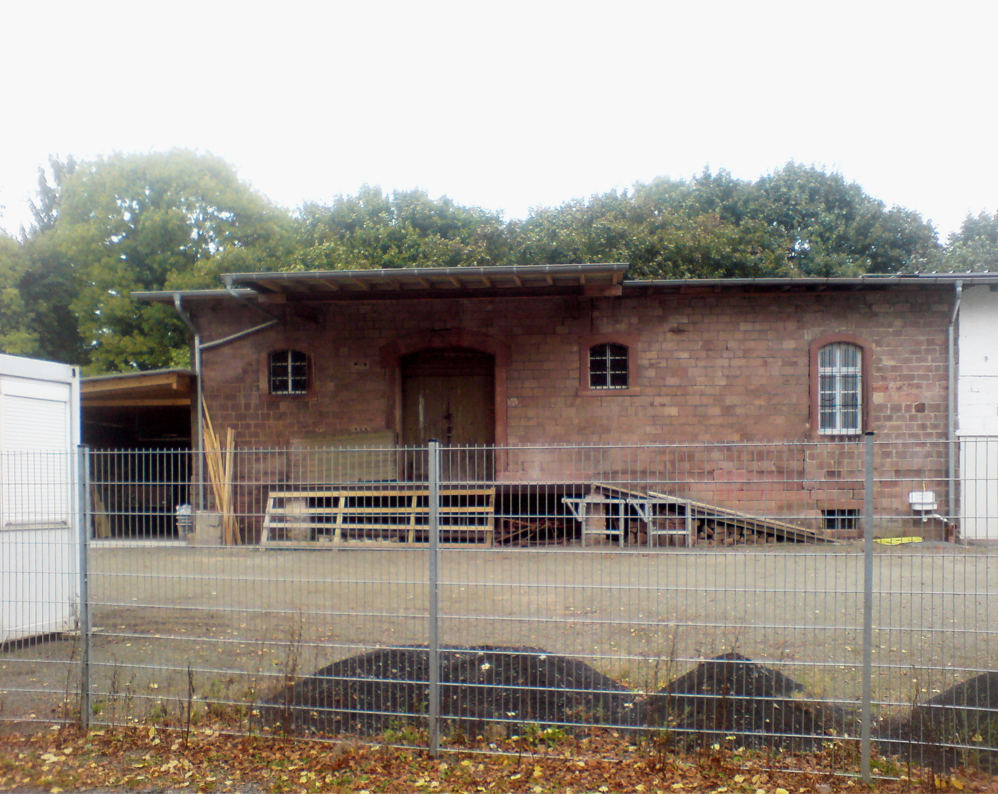 Die ehemalige Güterabfertigung am Bahnhof Scönenberg-Kübelberg